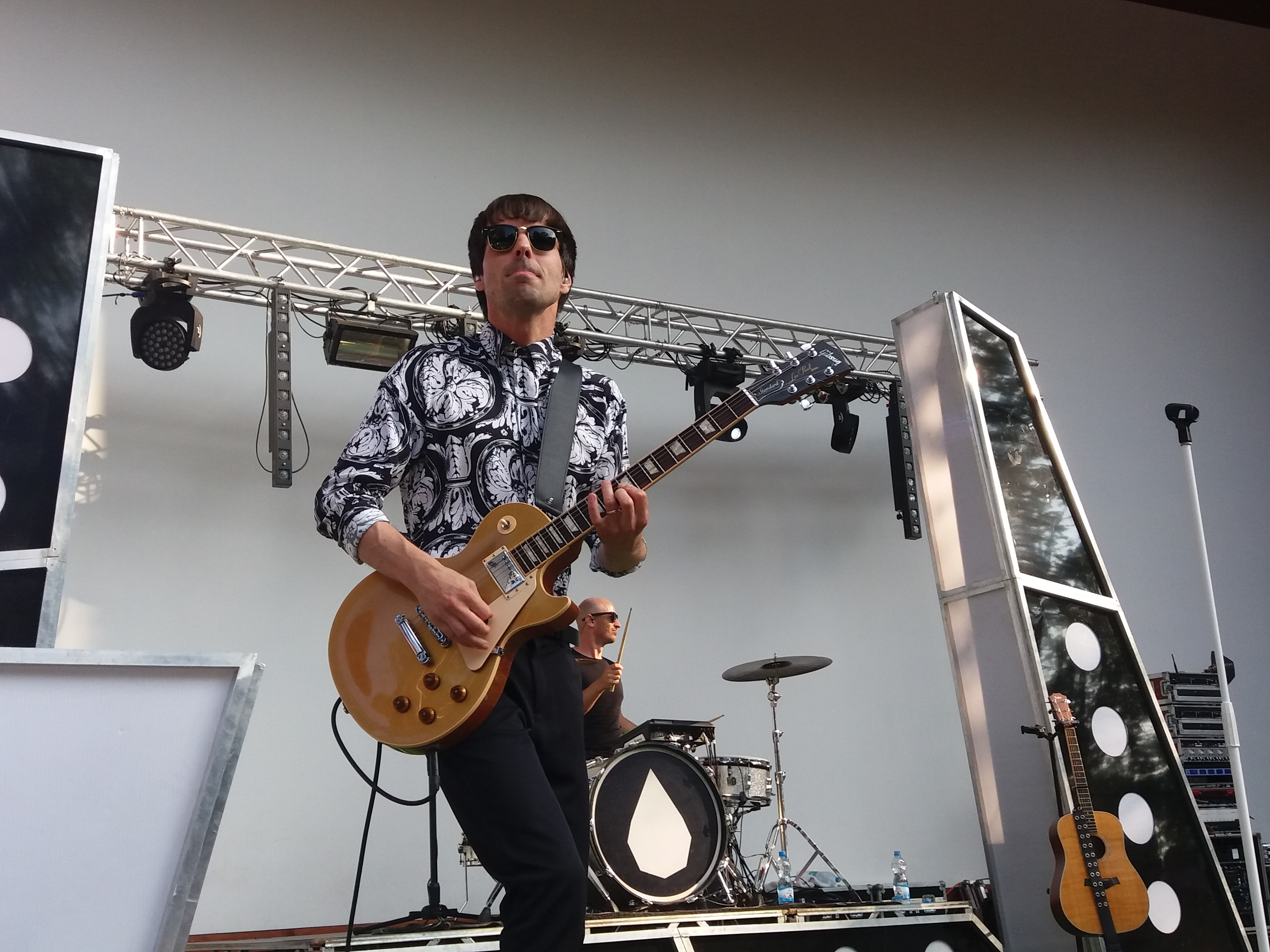 Lukáš Bundil se skupinou Slza na koncertě ve Valašském Meziřící 03. 06. 2018.